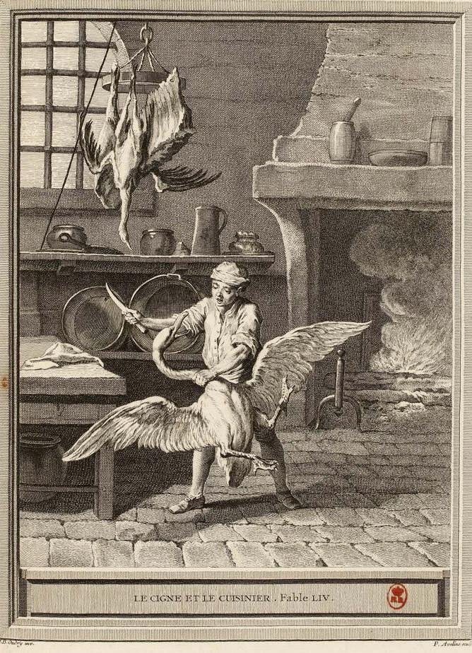 Gravure réalisée par Pierre-Alexandre Aveline d'après un dessin de Jean-Baptiste Oudry représentant la fable Le cygne et le cuisinier de Jean de La Fontaine (fable 12 du livre III). Cette gravure est parue dans l'édition complète des fables de La Fontaine, parue en quatre tomes chez l'éditeur Desaint & Saillant, rue saint Jean de Beauvais à Paris, 1755-1759.